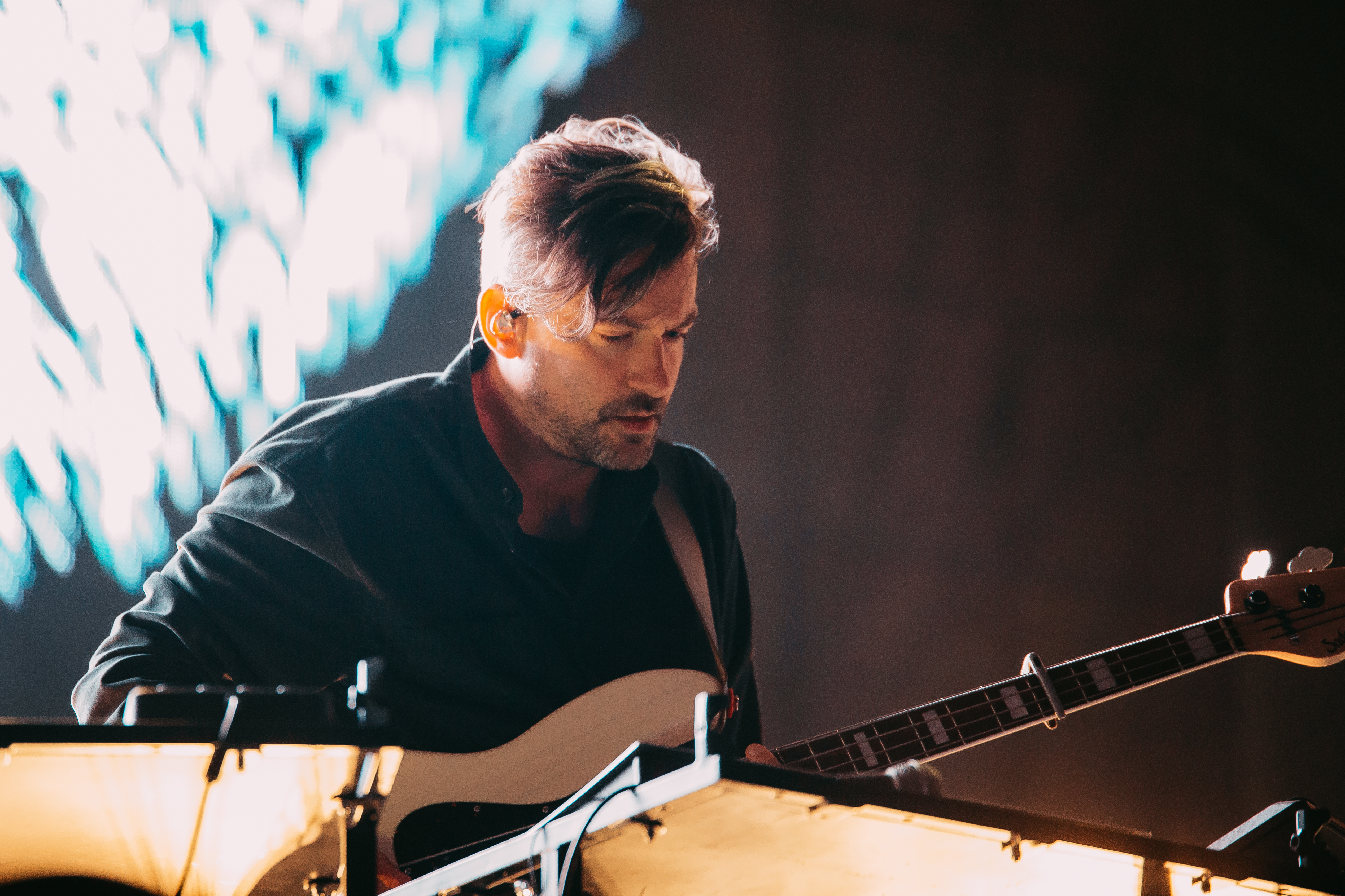 Photo: Krists Luhaers // @Kristsll